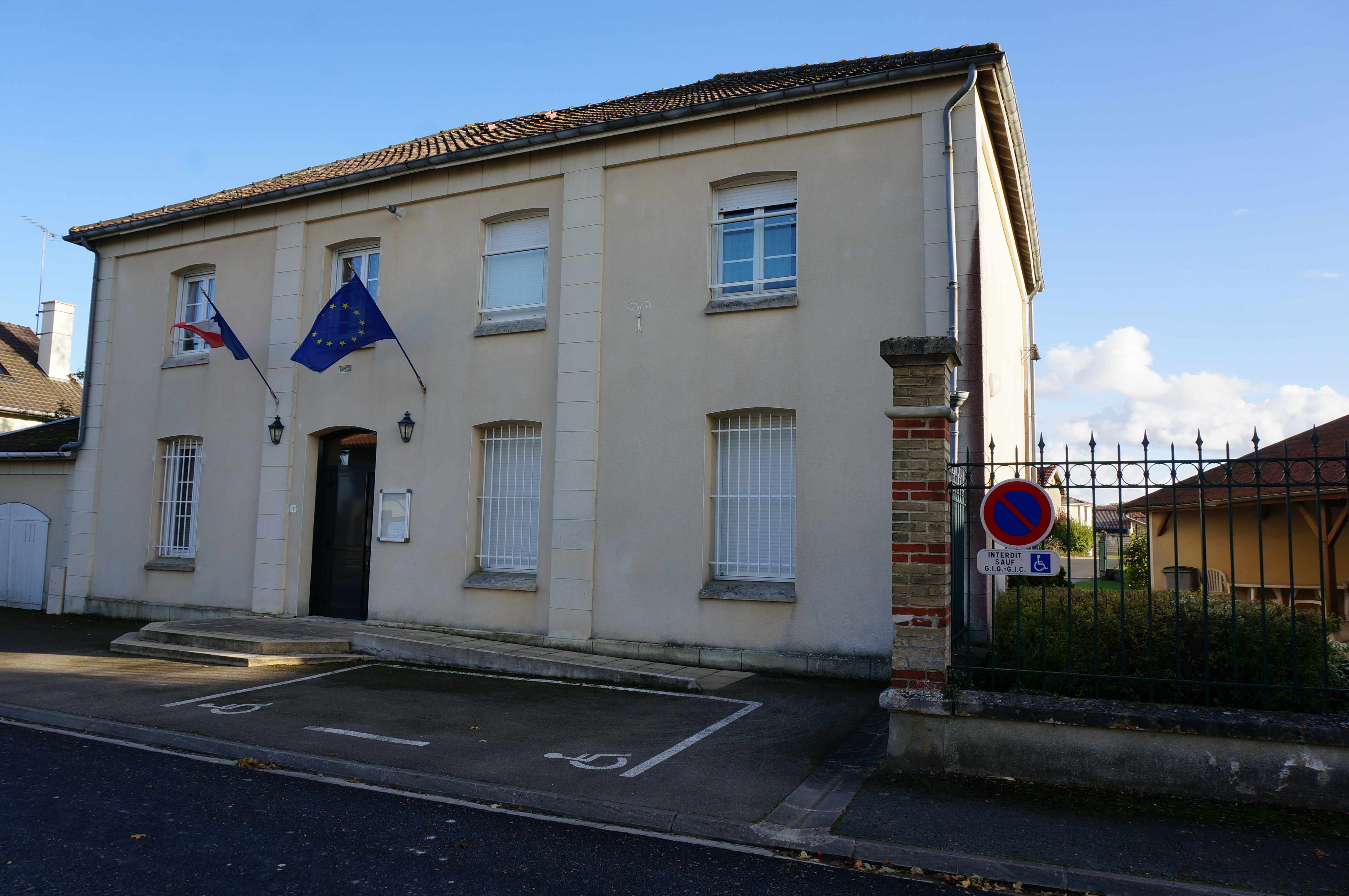 Dans la village.